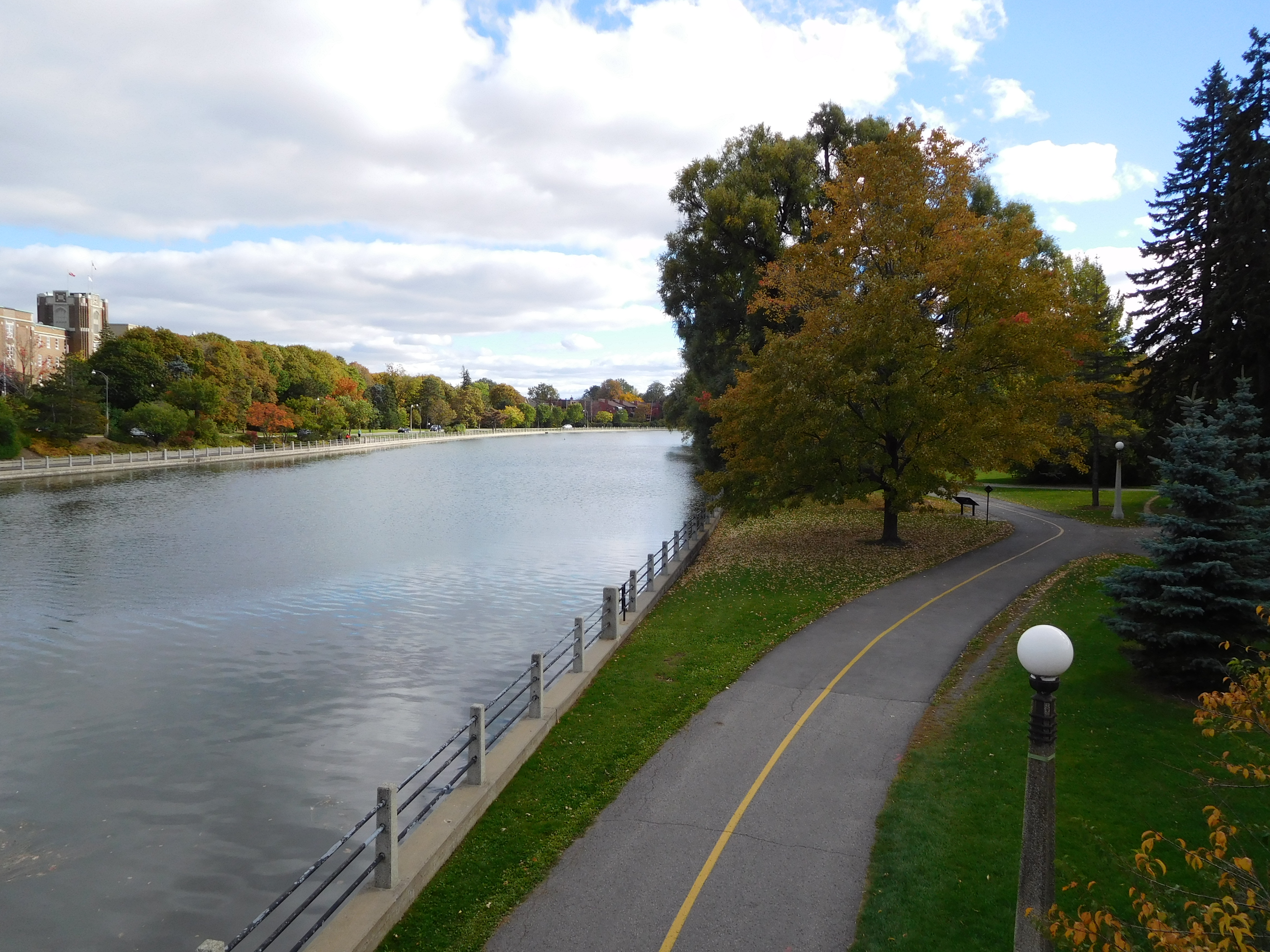 Le canal Rideau, à Ottawa, vu du pont Pretoria